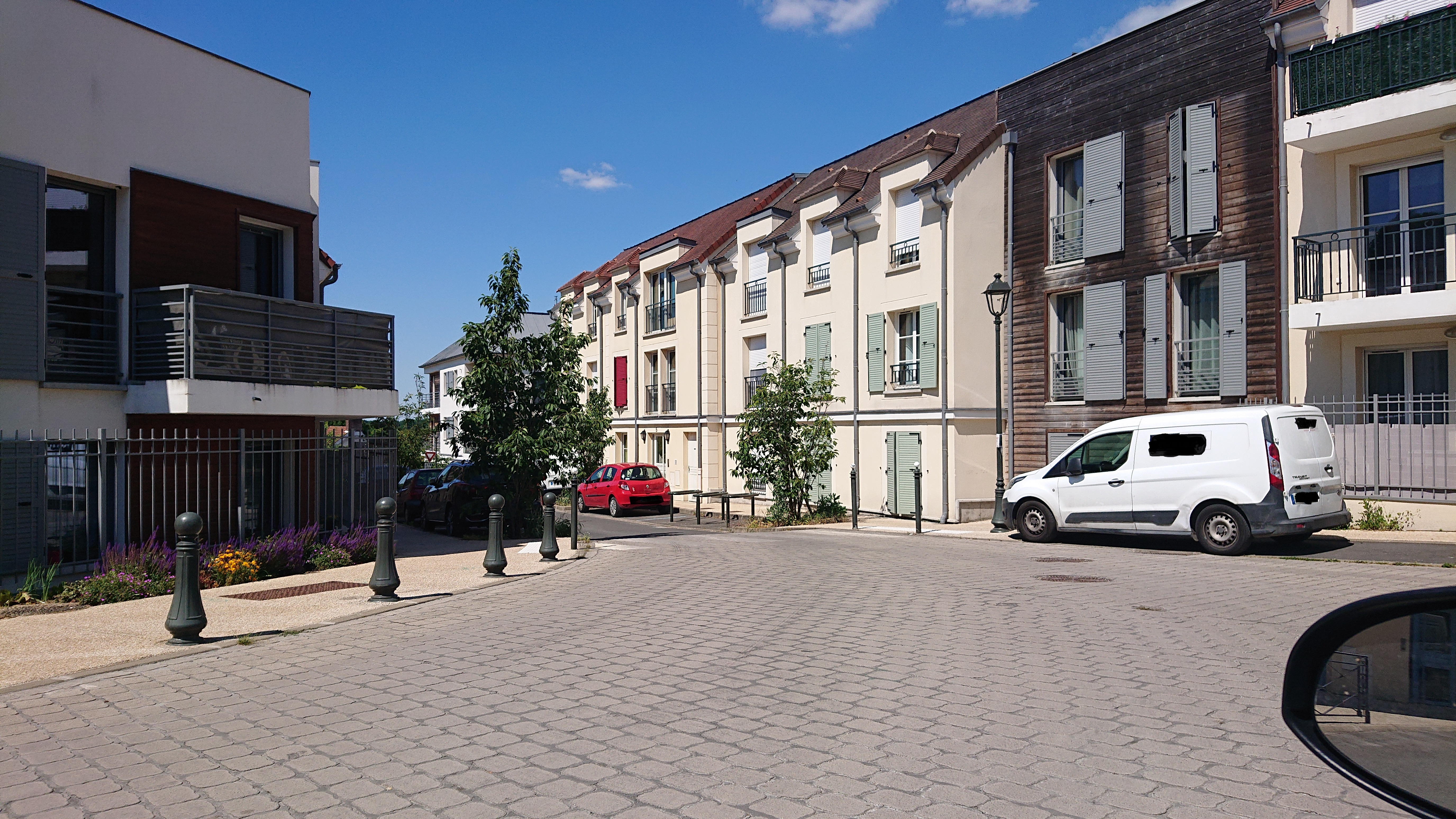 Coupvray Bourg neuf